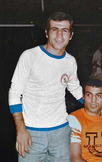 Mohammad Azarhazin and Karim Samadi